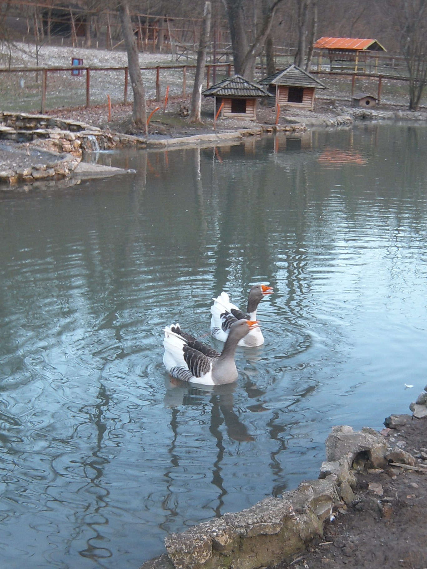 Zoo park Banja Luka